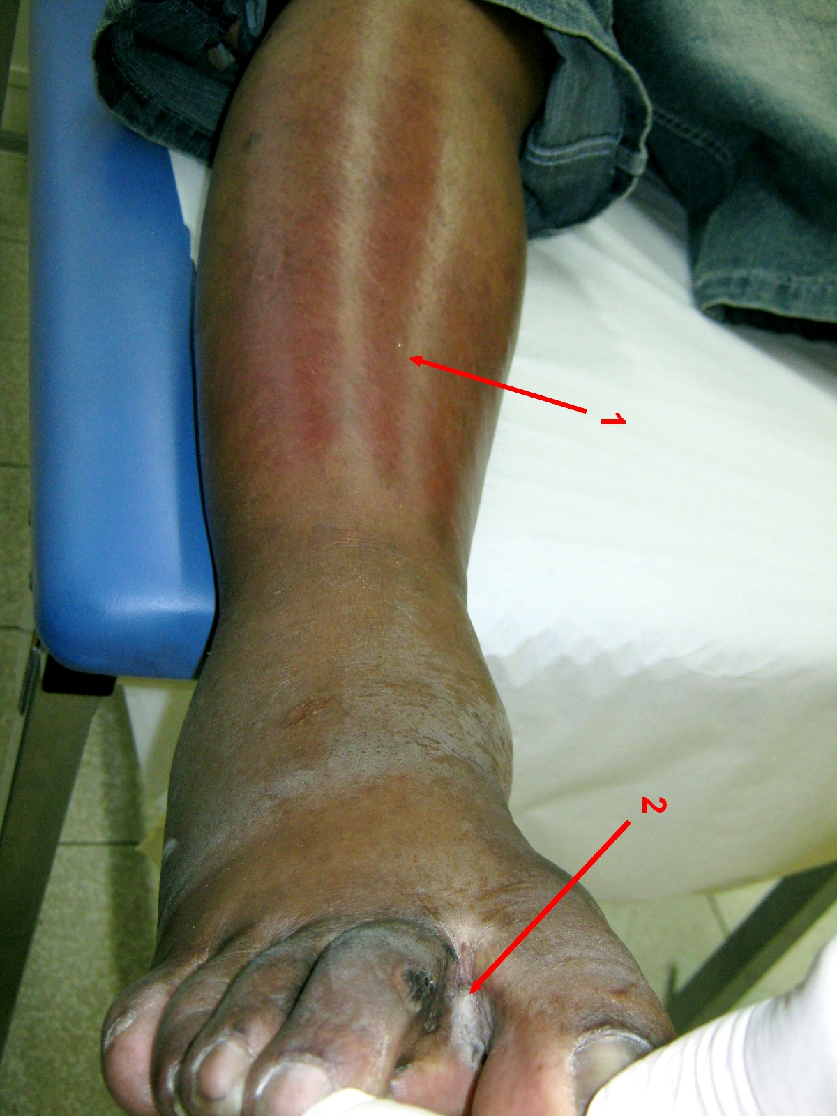 1 : érysipèle d'une jambe - 2 : porte d'entrée interdigitale